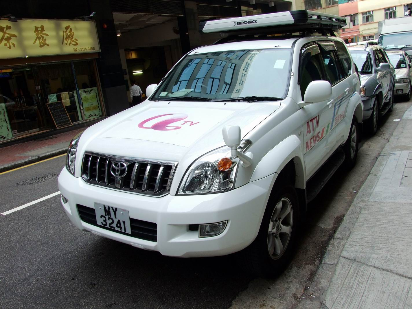 中文（台灣）: 亞視新聞豐田Land Cruiser採訪車MY3241。